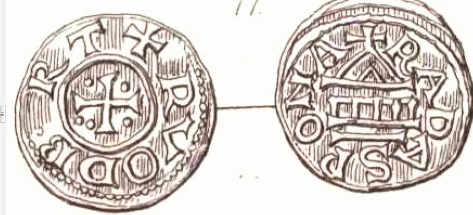 Regensburger Münze des Routpert (Münzmeister oder Babobne)